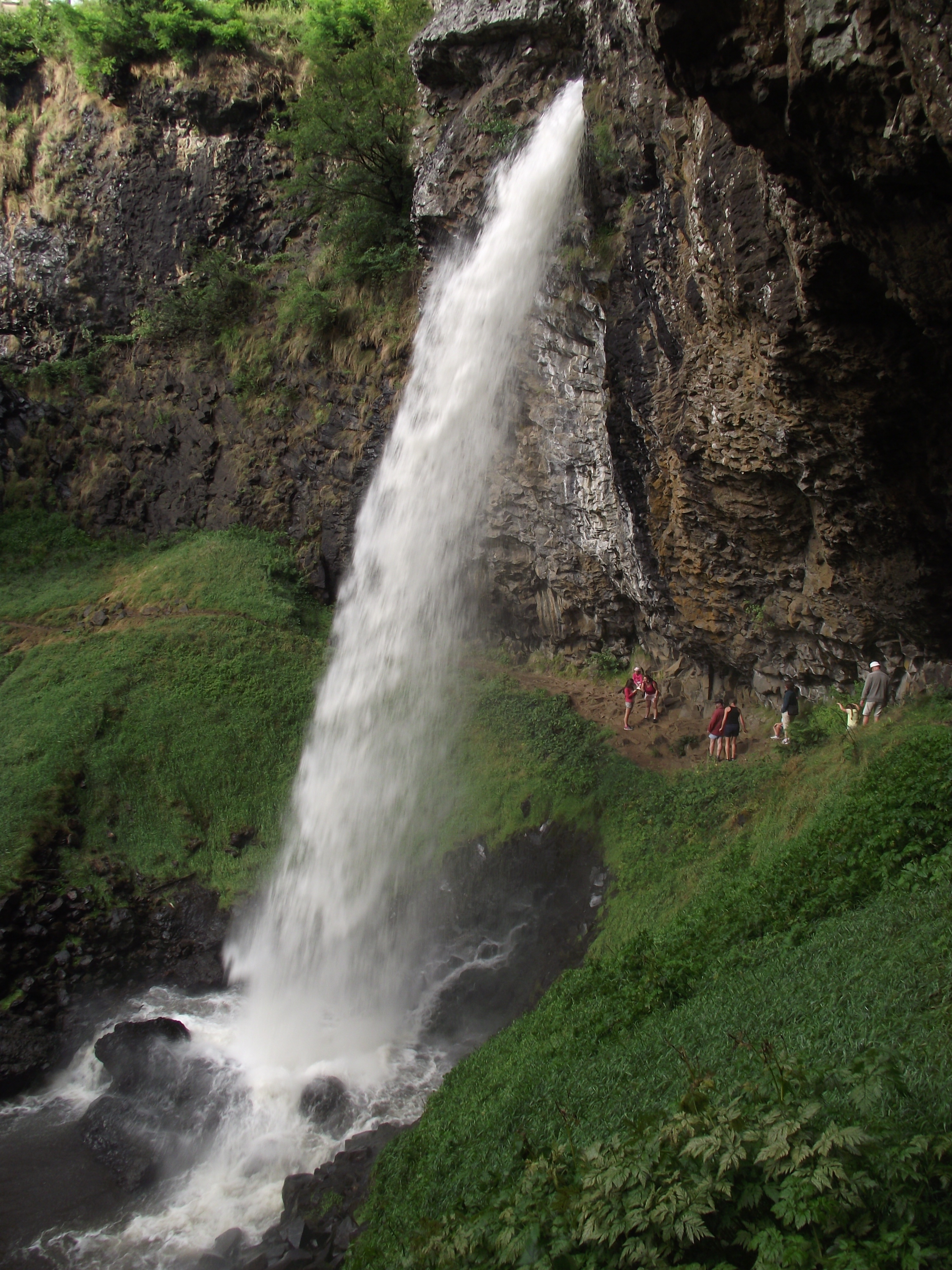 La cascade de Salins sur l'Auze près de Mauriac (Cantal).